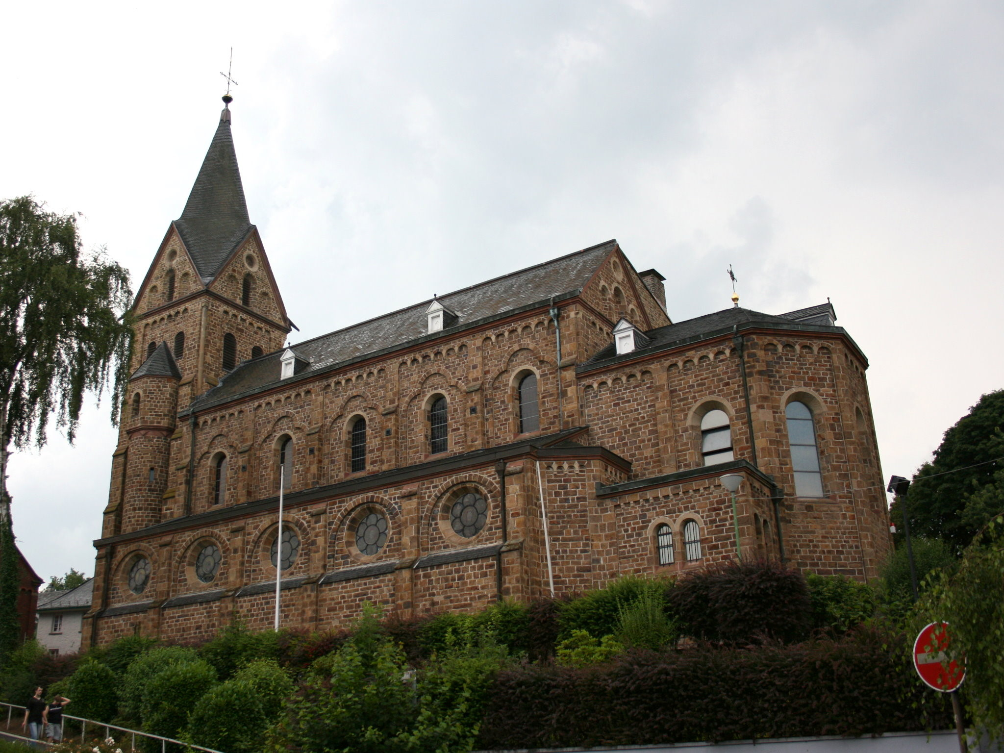 Sankt Mariä Himmelfahrt in Hückeswagen